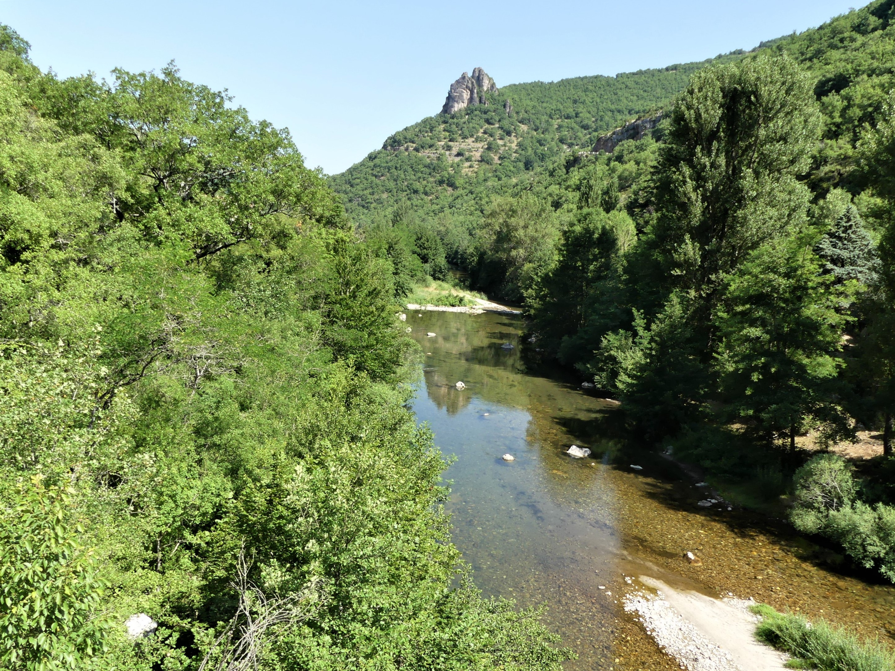 Les gorges de la Dourbie au pont de Gardies, entre les communes de Revens (à droite, département du Gard) et Nant (à gauche, département de l'Aveyron), France. Vue prise en direction de l'aval.